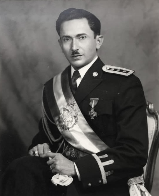 Carlos Castillo Armas